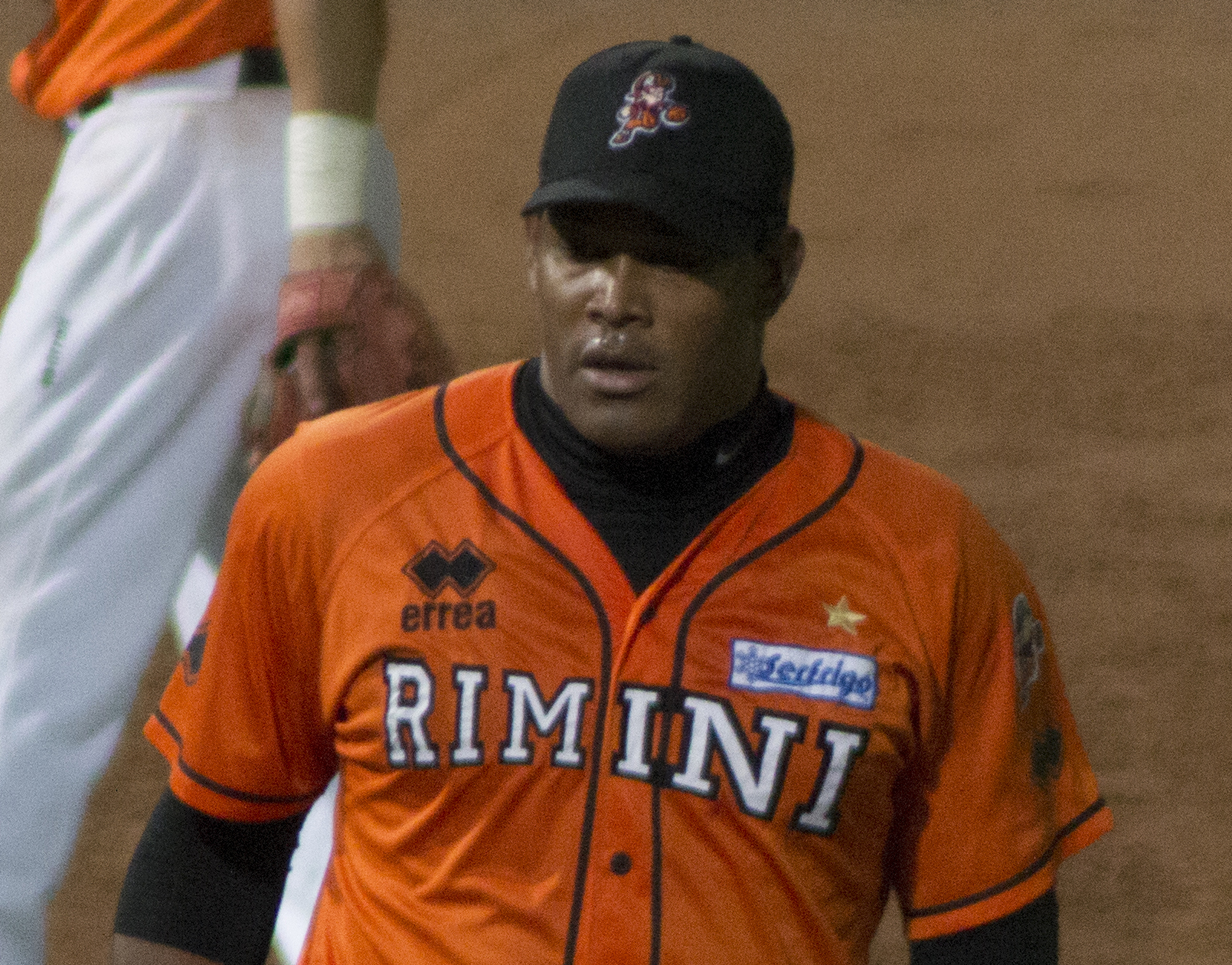 Enorbel Márquez nella semifinale IBL 2013 (gara3) disputata tra il Rimini Baseball e il Nettuno.